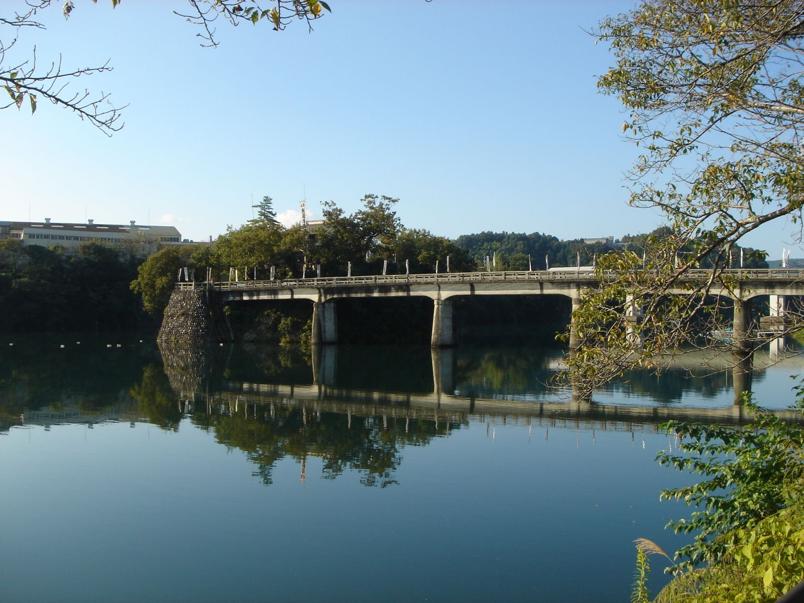 Shozanji(Temple) in Minokamo(小山寺),Minokamo,Gifu,Japan(岐阜県美濃加茂市)で撮影。